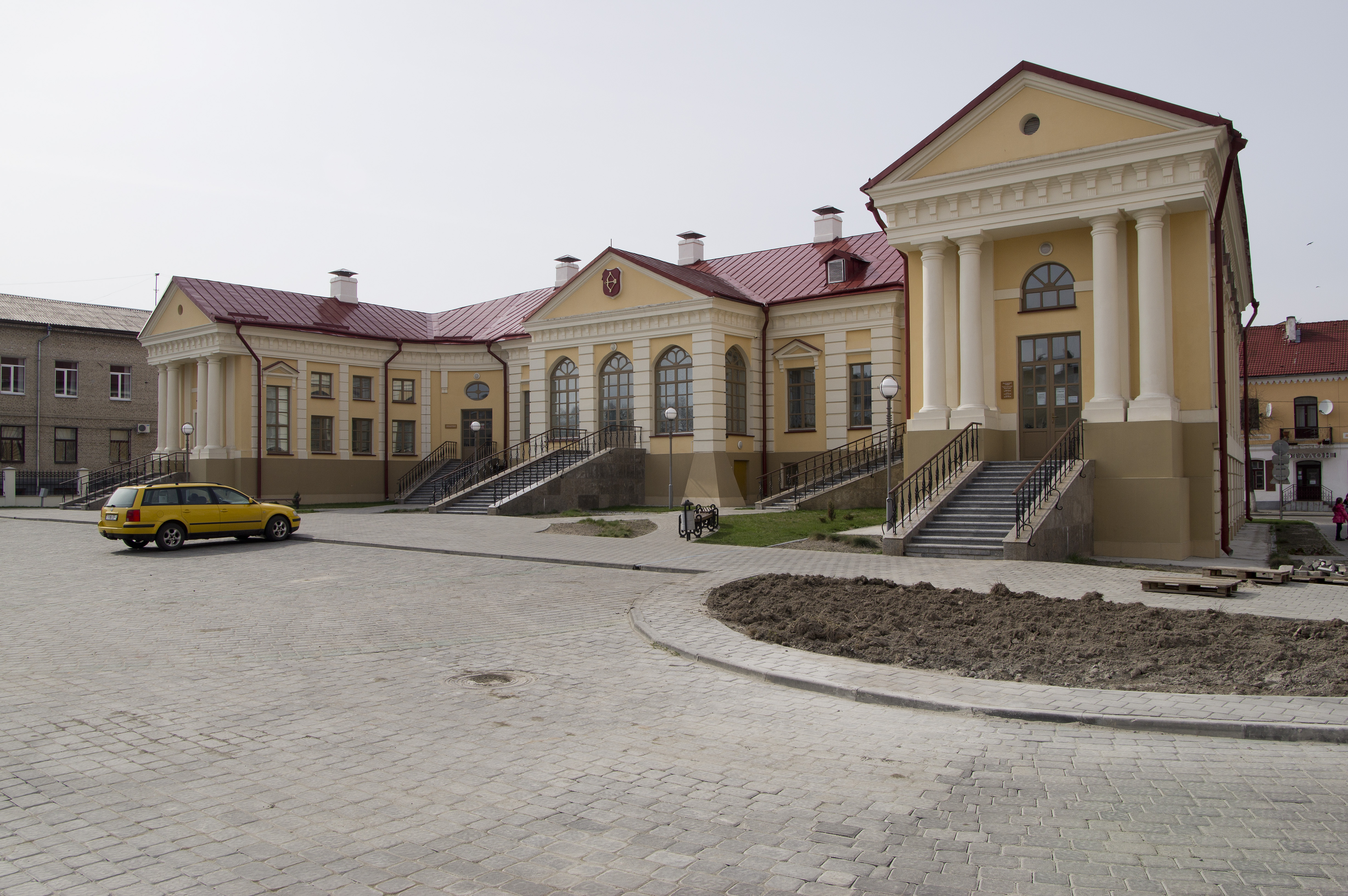 Беларуская (тарашкевіца): Будынак былога палаца Бутрымовіча. г. Пінск This is a photo of Belarusian heritage monument. Reference number: 112Г000539 ( WLM)